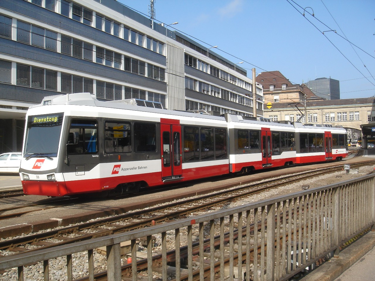 Be 4/8 33 der Appenzeller Bahnen abgestellt im St. Galler Nebenbahnhof